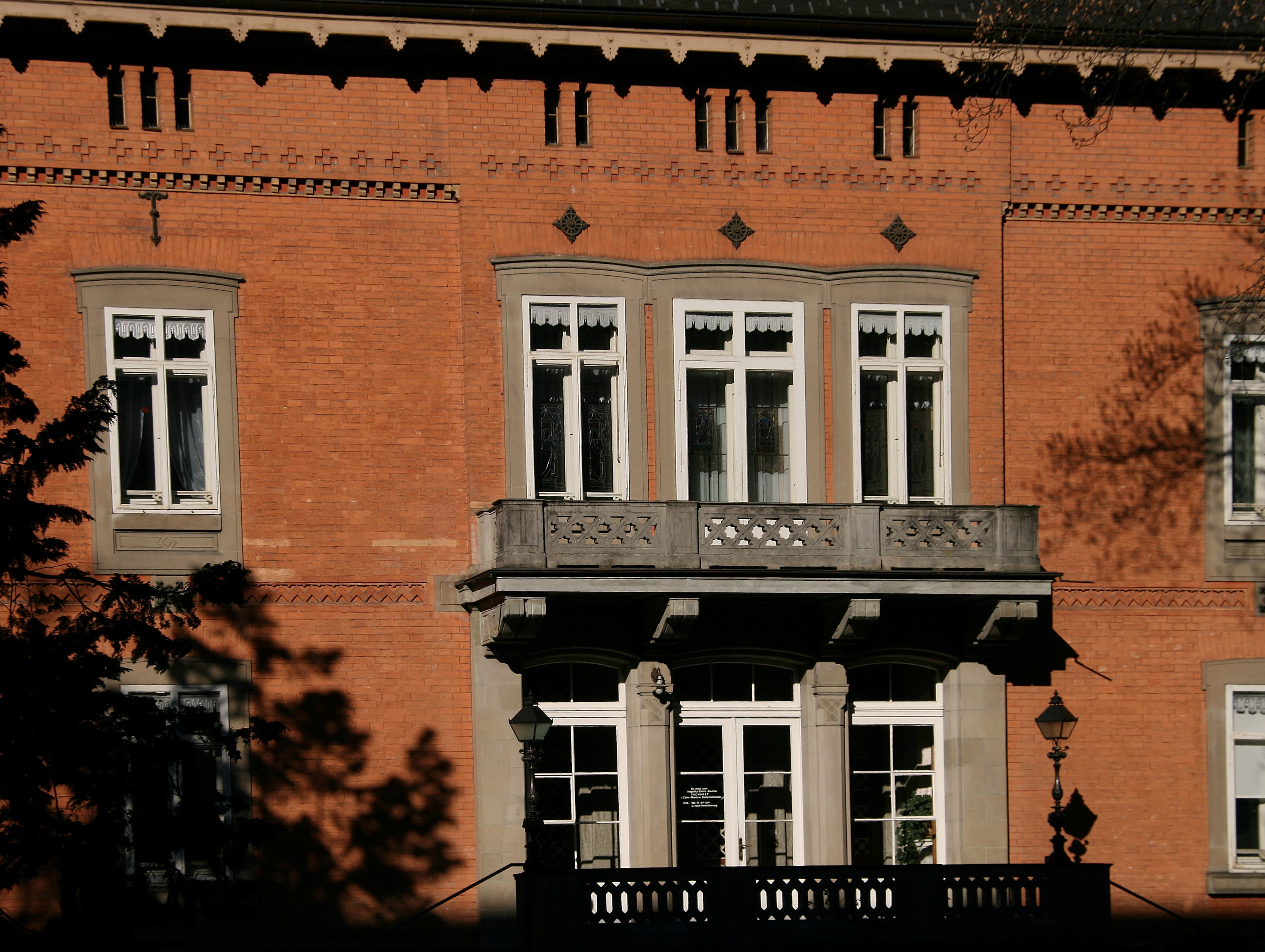 aus dem DEHIO Vorarlberg 1983: Reichsstrasse Nr. 170: Villa Mutter, erbaut 1855/56 von Bauinspektor „Spindler“, die erste bedeutende frühistorische Villenanlage in Vorarlberg. Kubisches Hauptgebäude in parkartigem Garten. Unverputzte Backsteinwände auf Sandsteinsockel, dreiachsiger flacher Mittelrisalit, Terasse mit seitlichen Treppen, Sandsteinbalkon, umlaufende Geschoßtrennung durch Zickzackfries, unter dem Dach Lüftungsschlitze, in den Fenstern Jalousienschabracken aus gepresstem Blech; rückseitig flacher Mittelrisalit mit gekuppelten Fenstern. Originale Ausstattung, im Erdgeschoß straßenseitig repräsentative Suite mit Musikzimmer (Deckenmalerei aus der Bauzeit), Neurenaissance-Kachelöfen, Zinnlavabos, Türen mit Gittern; im Hauptgeschoß Wand- und Deckenmalereien (Ornamentik und Groteske), Stukkaturen, Öfen.*** gesehen in Feldkirch Levis.